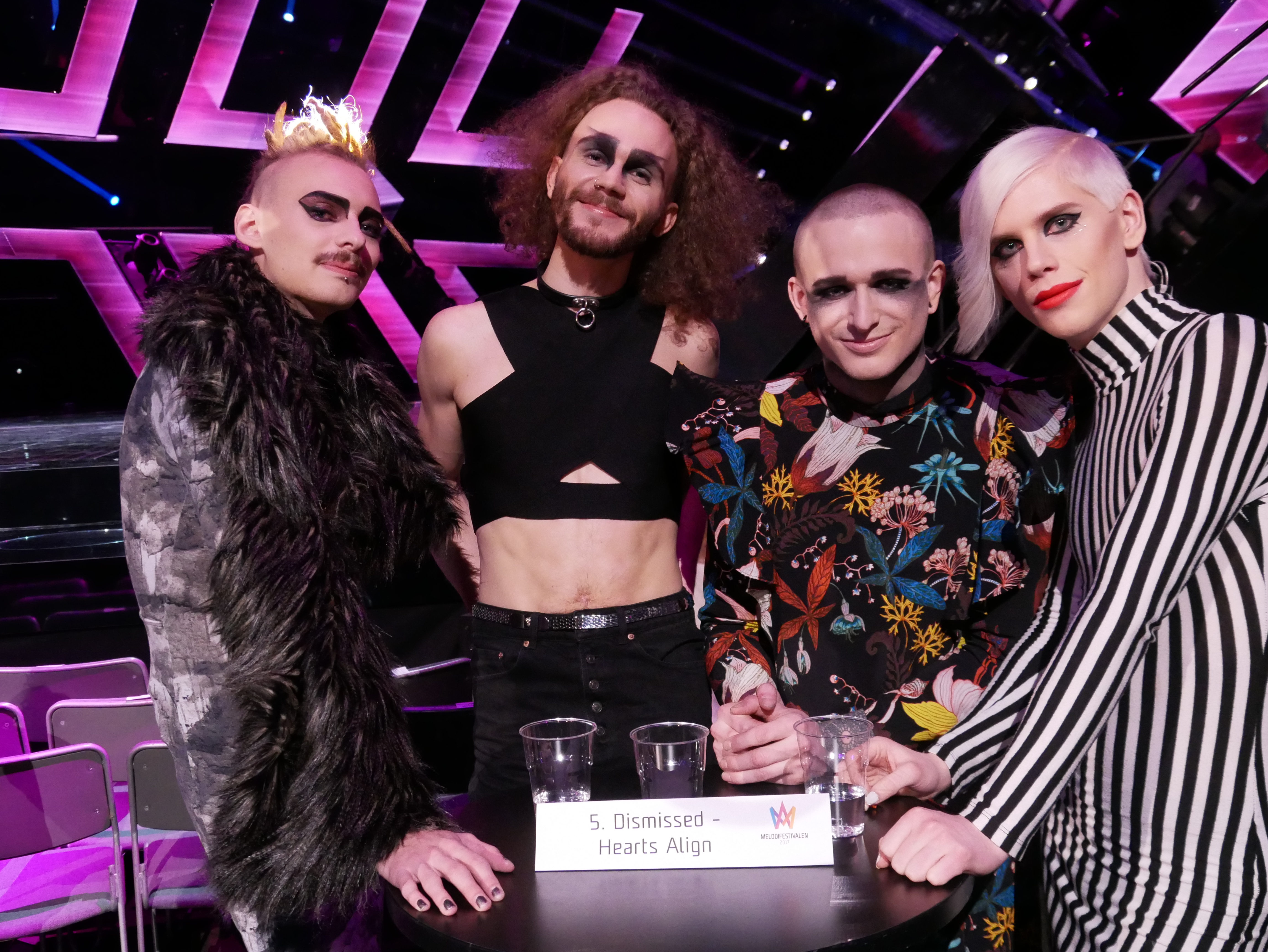 Melodifestivalen 2017, deltävling 2